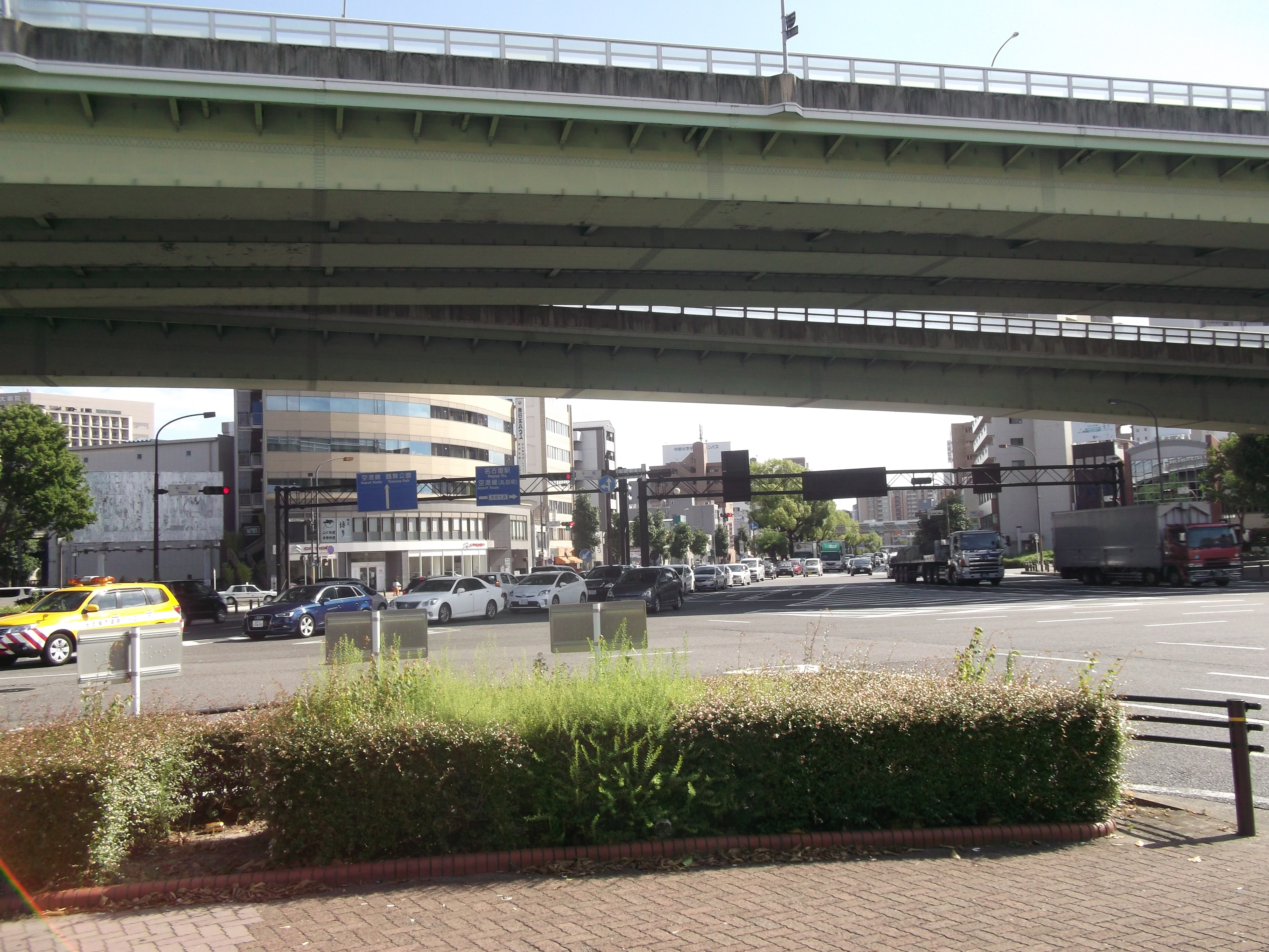 名古屋市中区の千早交差点を北側から撮影